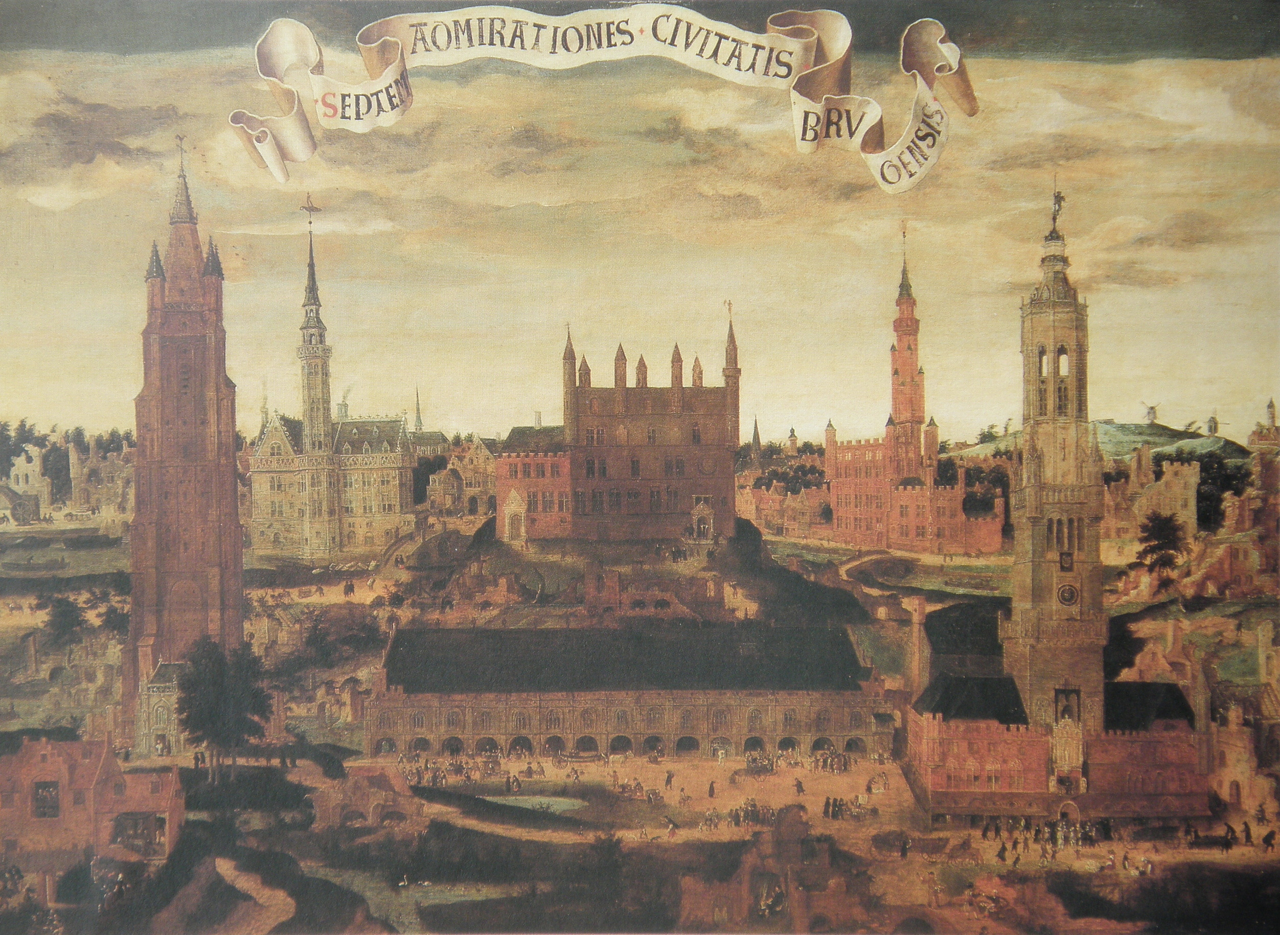 Septem Admirationes Civitatis Brugensis, prob. de Pieter Claeissins l'Ancien. vers 1550.